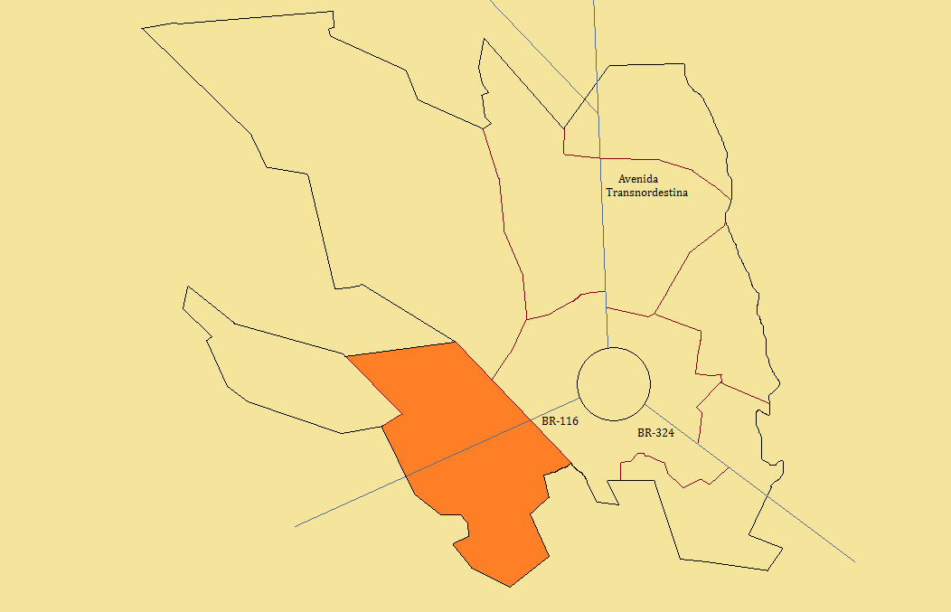 Distrito João Durval Caneiro em cor laranja, em Feira de Santana, Bahia, Brasil.